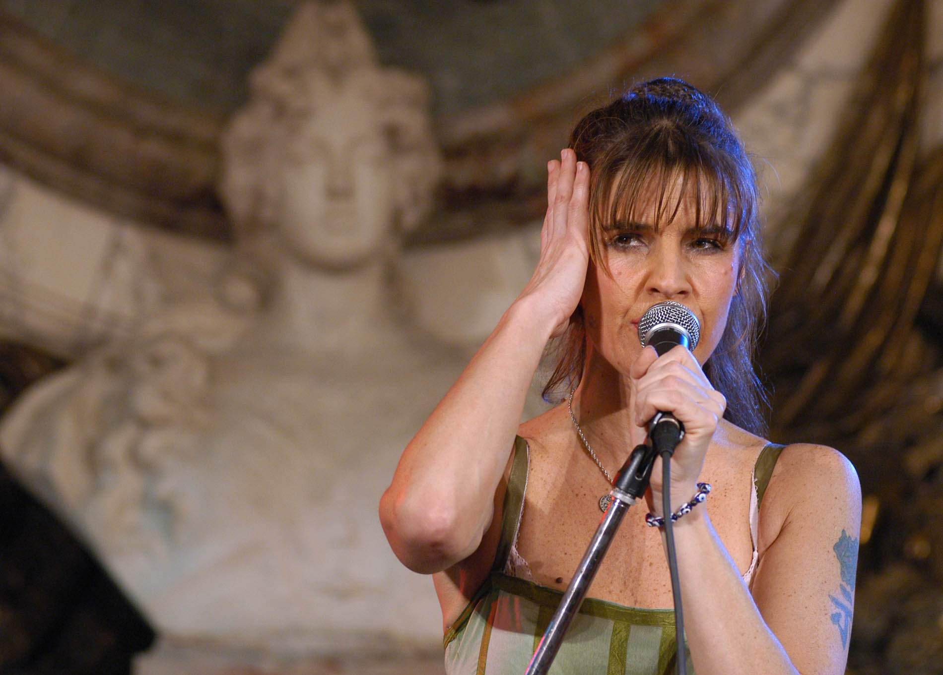 Fabiana Cantilo. En la Casa Rosada. Buenos Aires. Argentina. 16 de diciembre de 2005. foto oficial